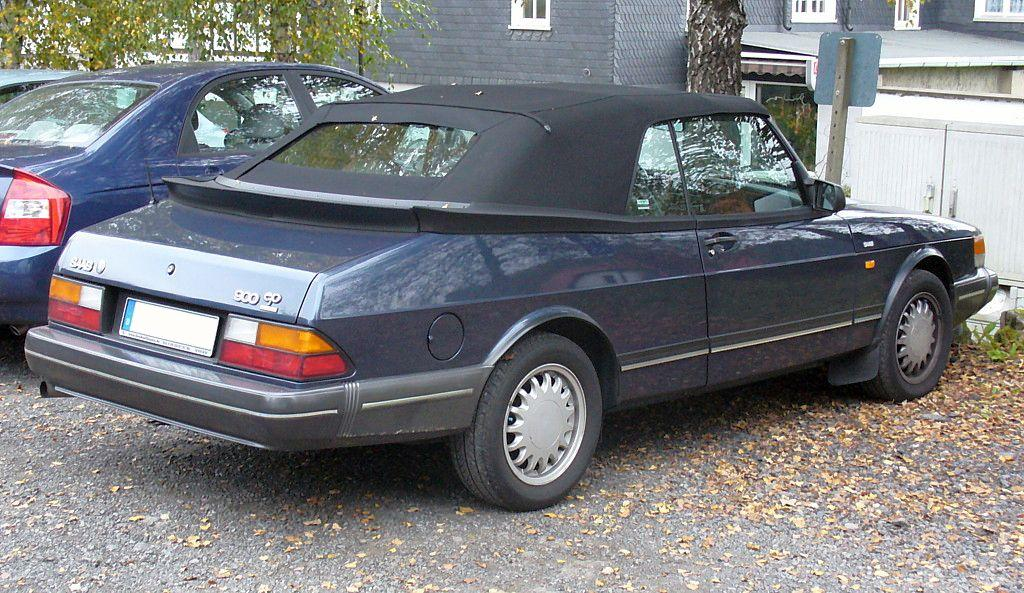 Saab 900 EP Cabriolet